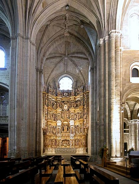 Date du cliché : septembre 2001.